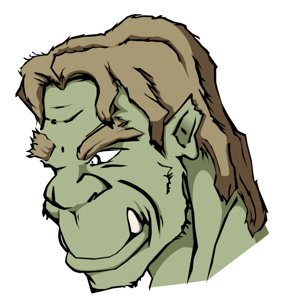 Ein Ork. Dieser Ork entspricht eher dem Aussehen der Orks in Fantasy-Spielen, wie zum Beispiel WarCraft, als dem der Orks, die J. R. R. Tolkien beschrieben hat.